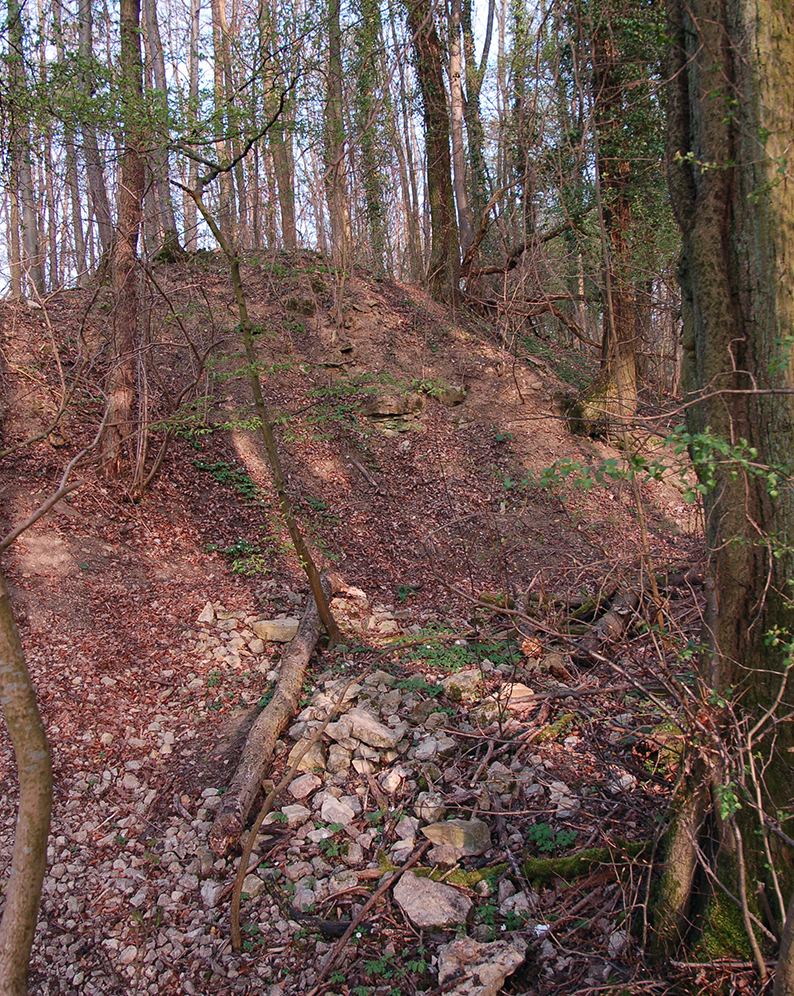 Burgstall Remmigheim: Schutthald des ehemaligen Mauerrings